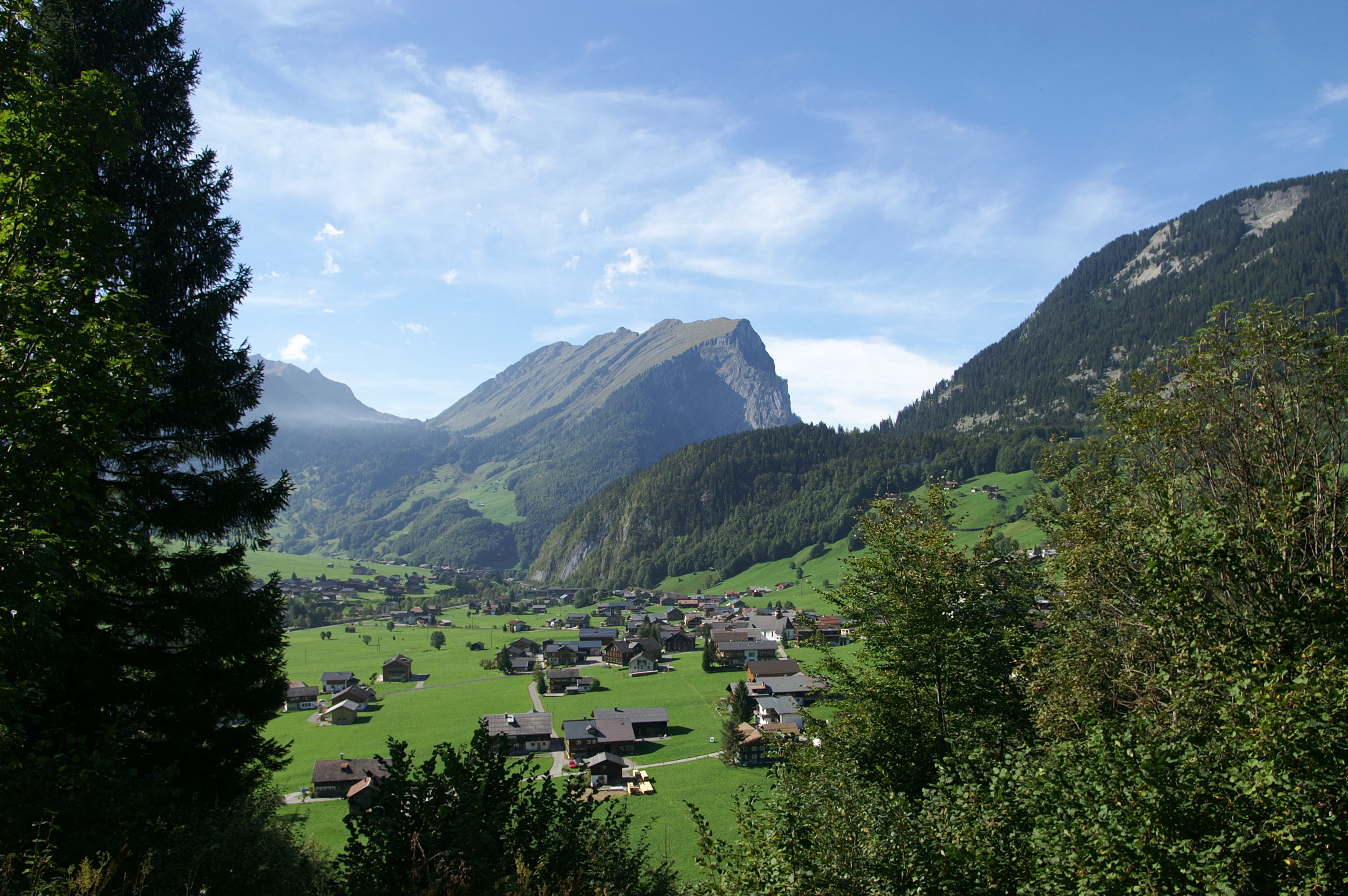 Blick vom Holdamoos auf die Kanisfluh in Au (Vorarlberg).